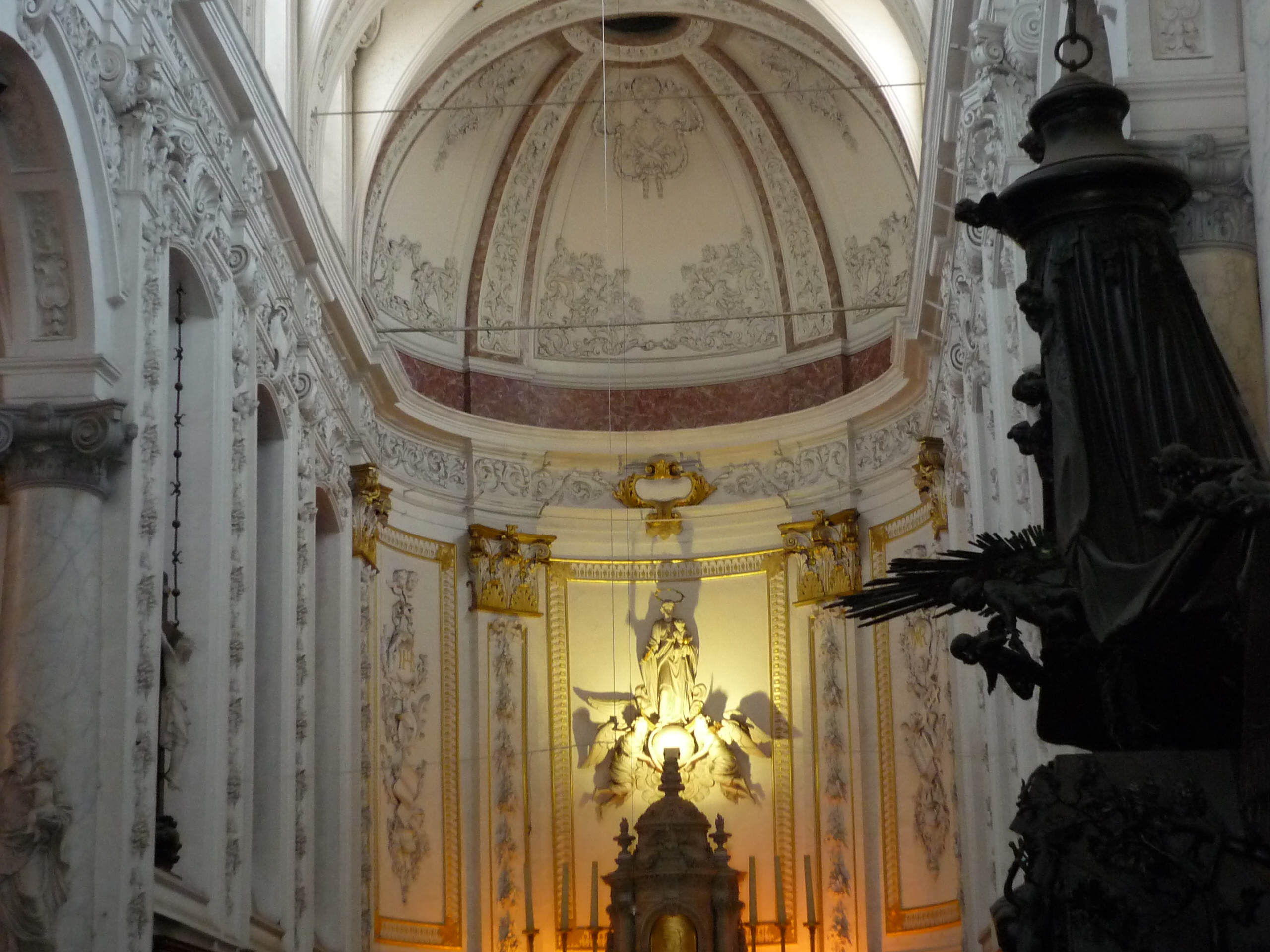 Le choeur de l'église du Finistère à Bruxelles, ornements en stuc de François Antoine Peri, église du Finistère à Bruxelles, vers 1727